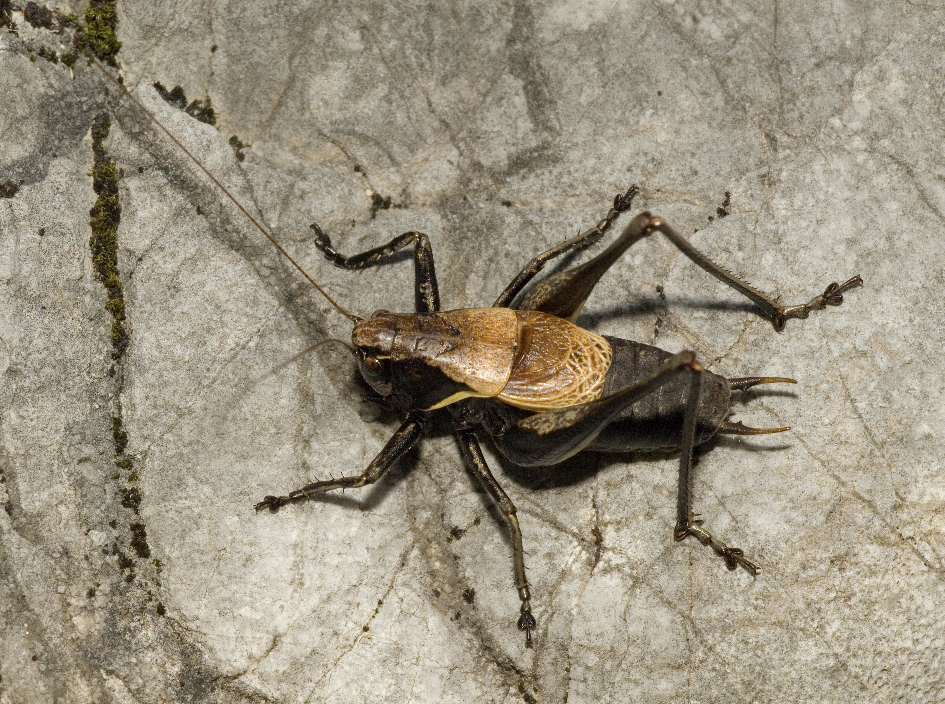 Pholidoptera aptera (male)